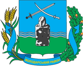 Герб Володарського району Донецької області